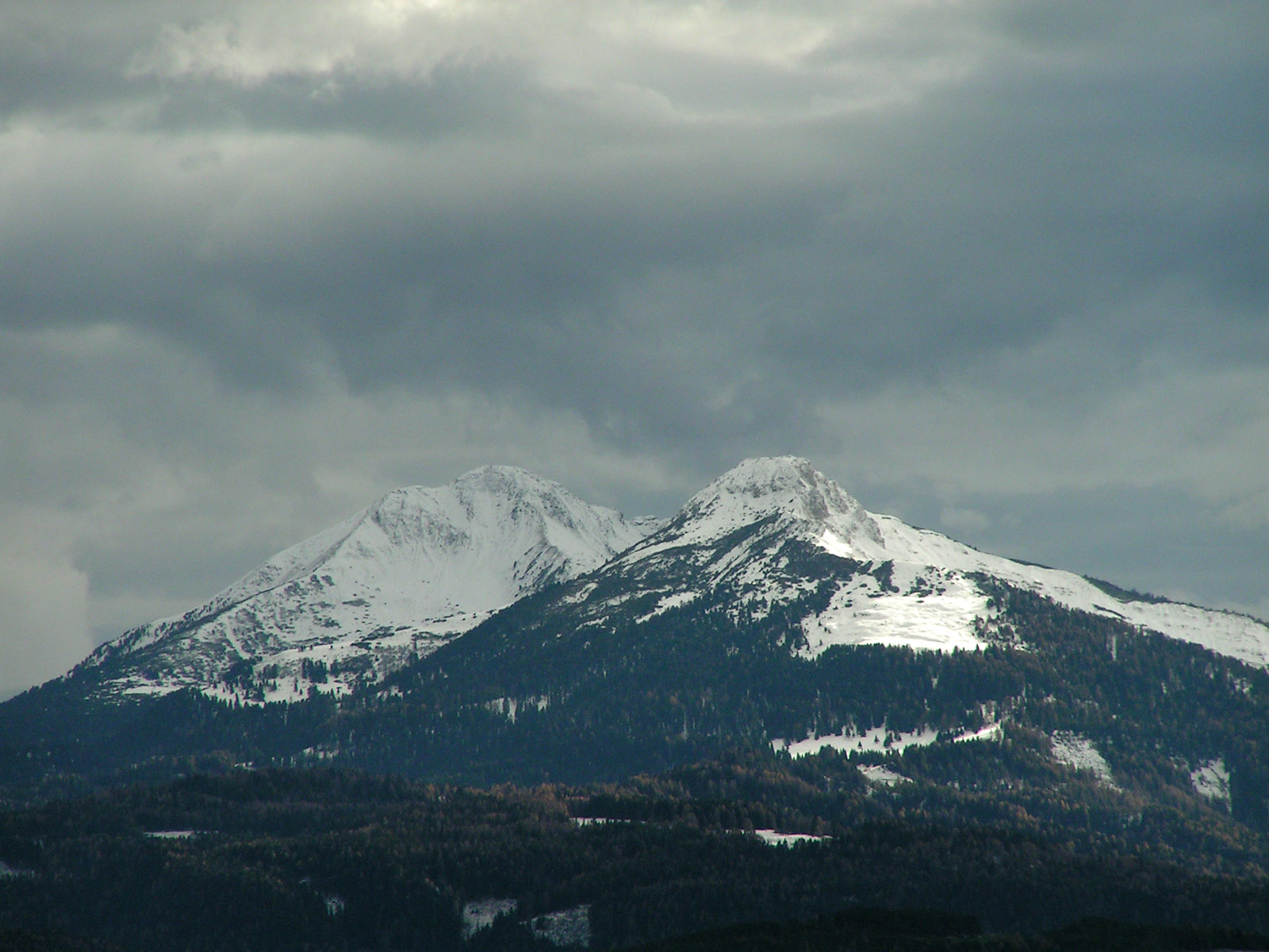 Schwarzhorn (links) und Weißhorn (rechts), Blick vom Ritten (Norden) aus